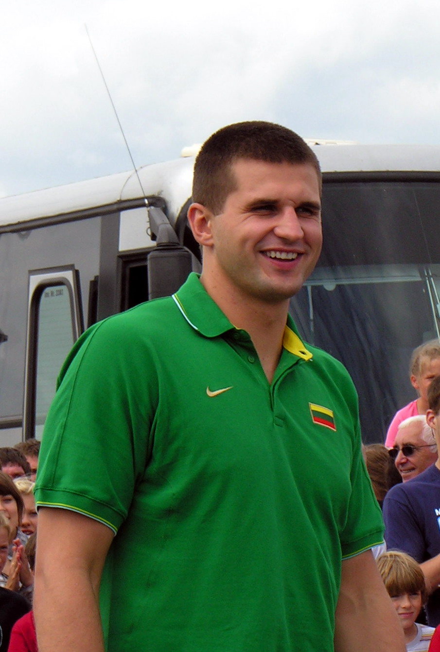 Linas Kleiza, Nacionalinės vyrų krepšinio rinktinės susitikimo Mažeikiuose metu 2009 m. liepos 31 d.